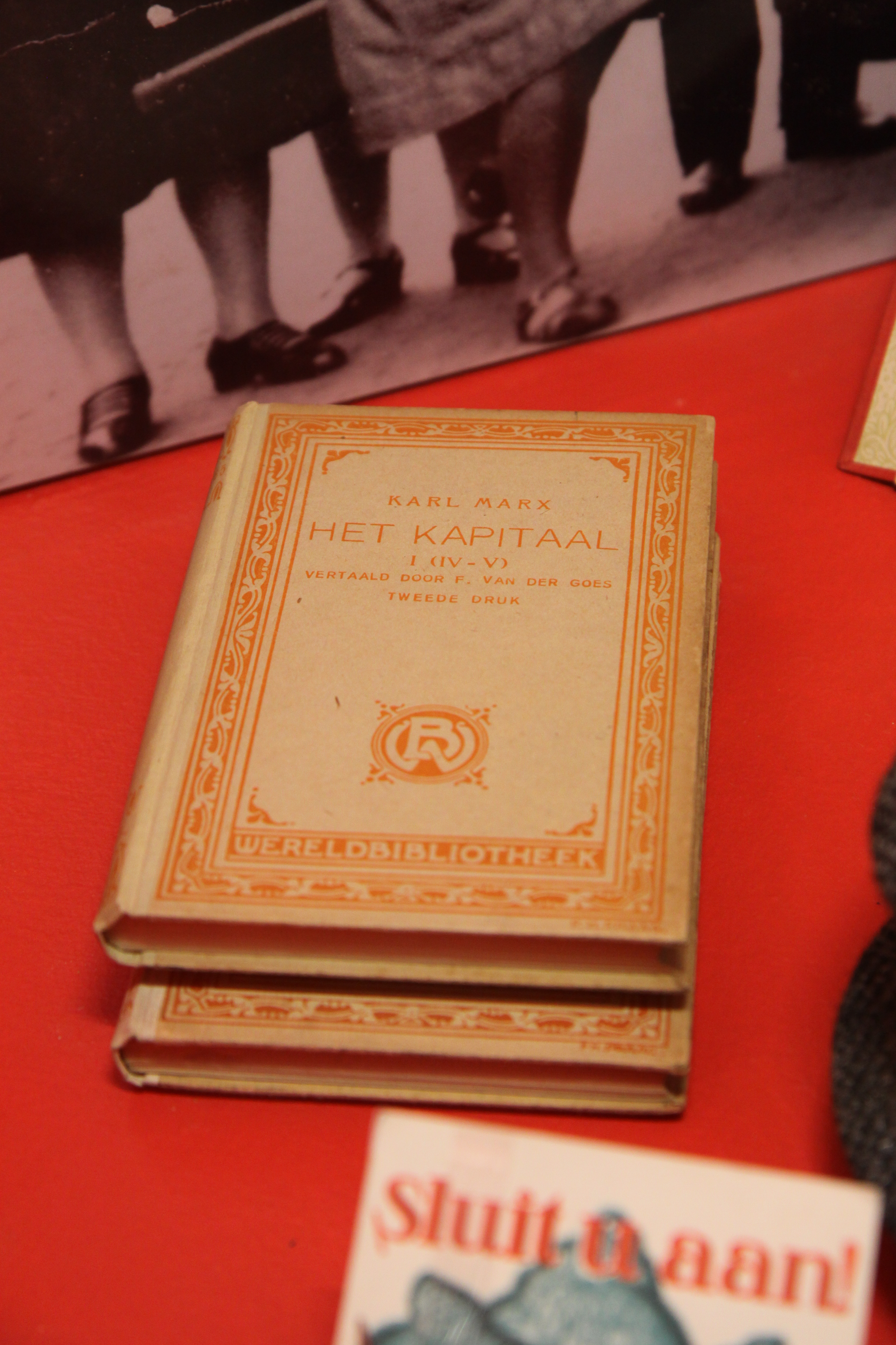 Het Kapitaal van Karl Marx vertaald door Frank van der Goes (fotonummmer 090626-111709_ 1548_50D)